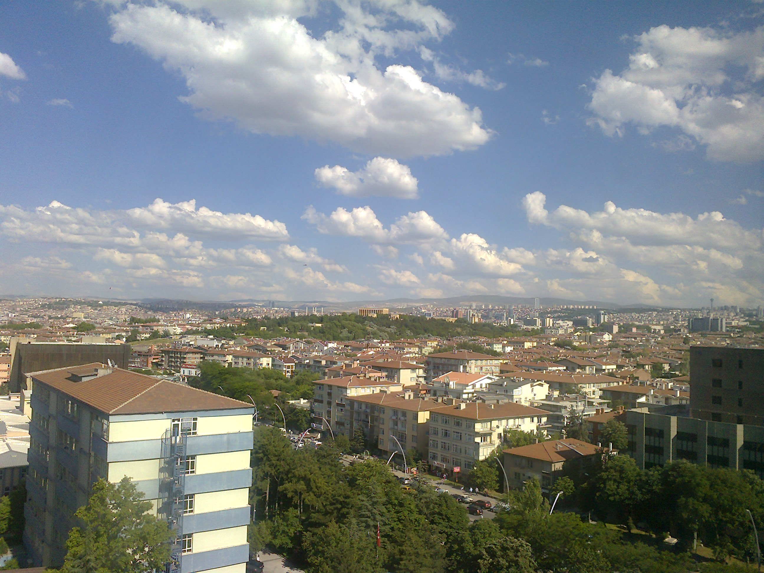 Bahçelievler, Ankara